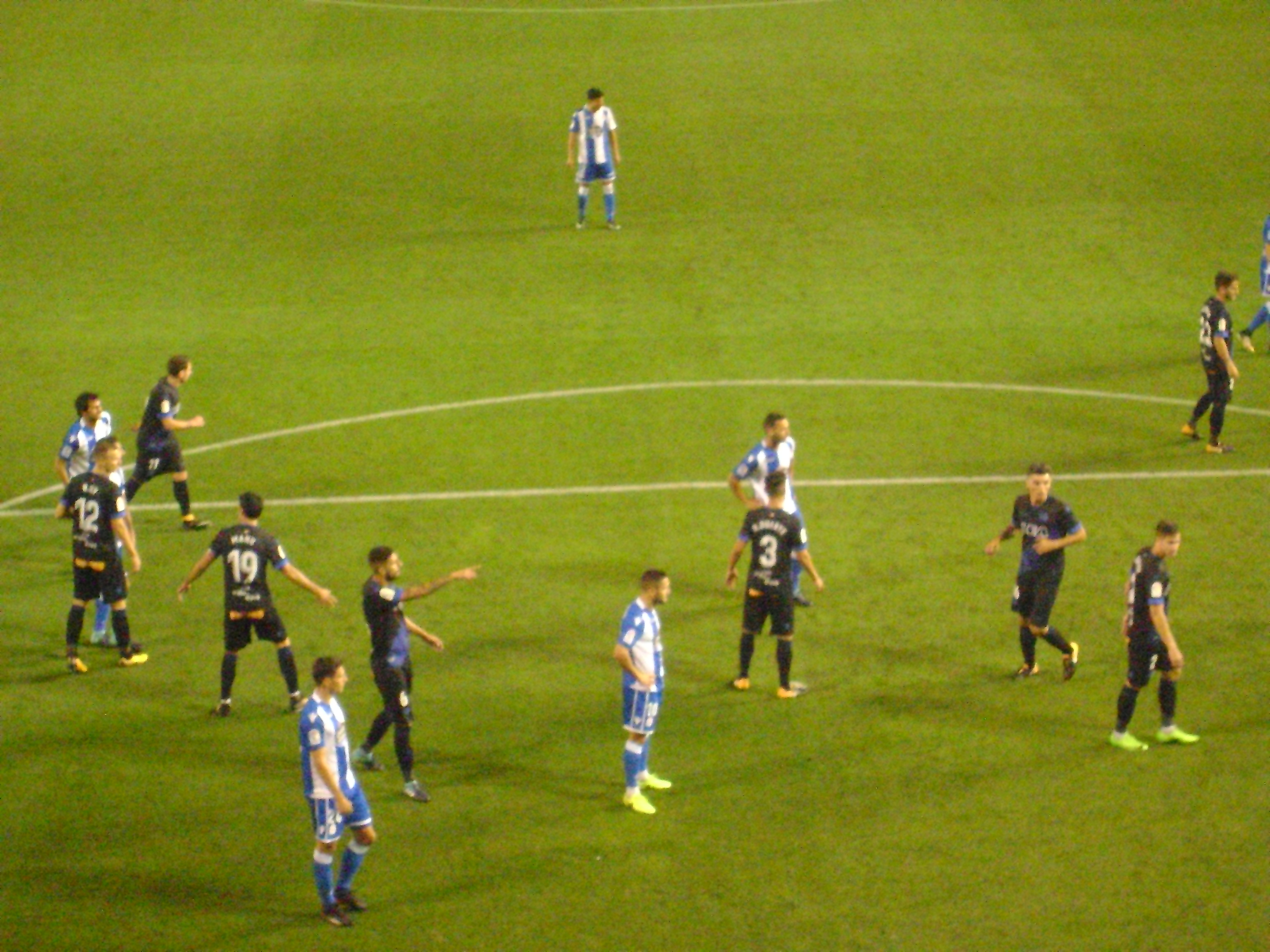 depor alaves